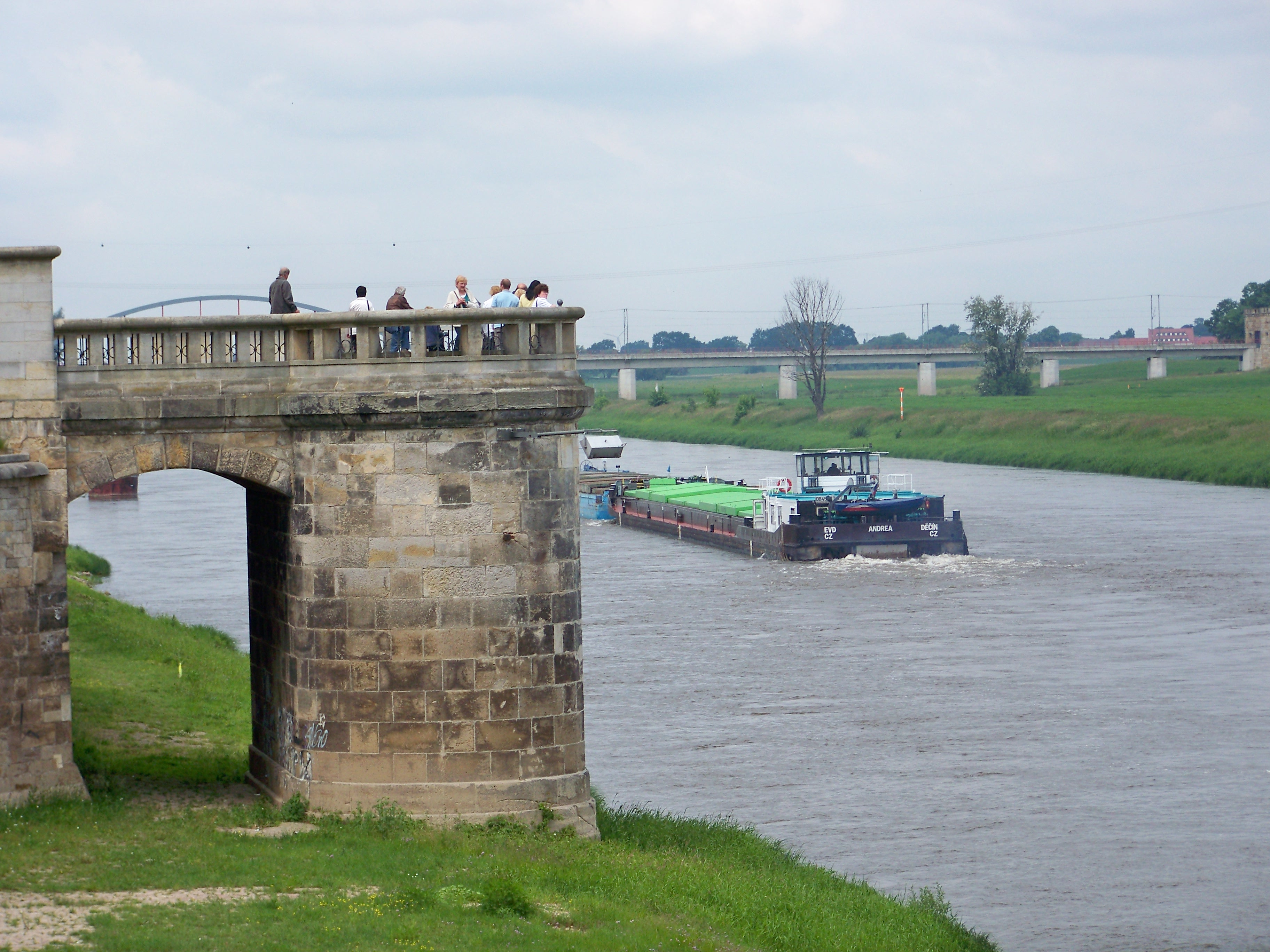 Aussichtsplattform an der Elbe in Torgau, im Hintergrund die Elbebrücke der Eisenbahnstrecke Cottbus-Eilenburg-Leipzig/Halle